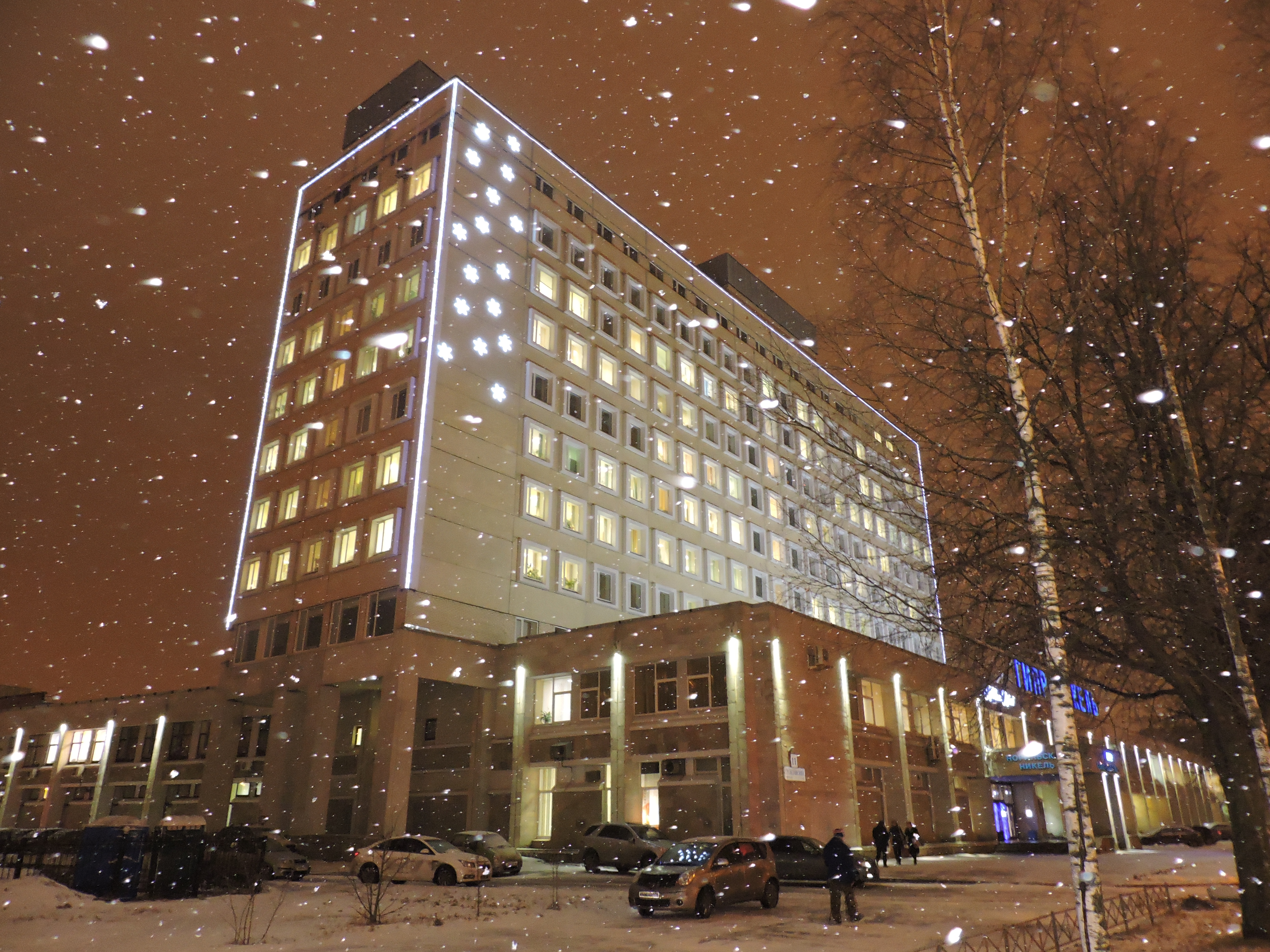 Здание института "Гипроникель"